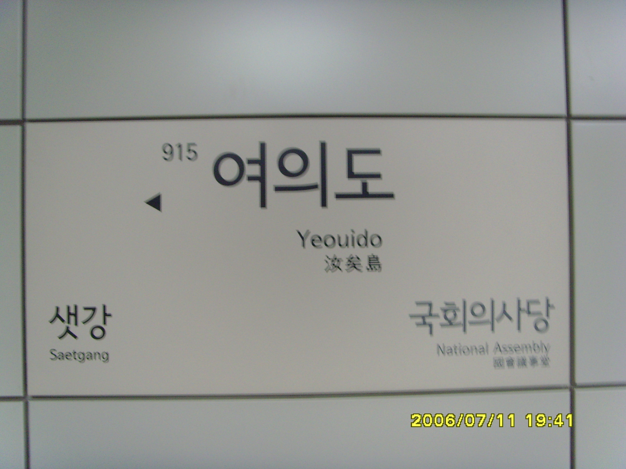 ソウル地下鉄9号線汝矣島駅 駅名標